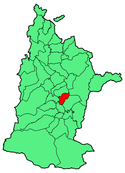 Aipaturiko udalerriaren kokapena Zuberoan